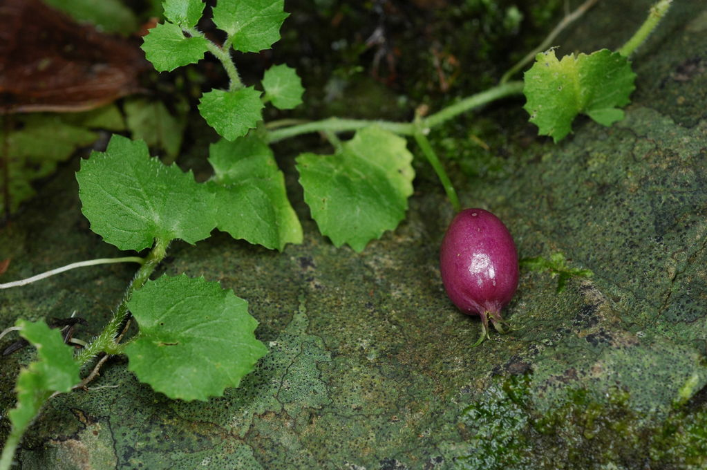 Pratia nummularia (Campanulaceae)